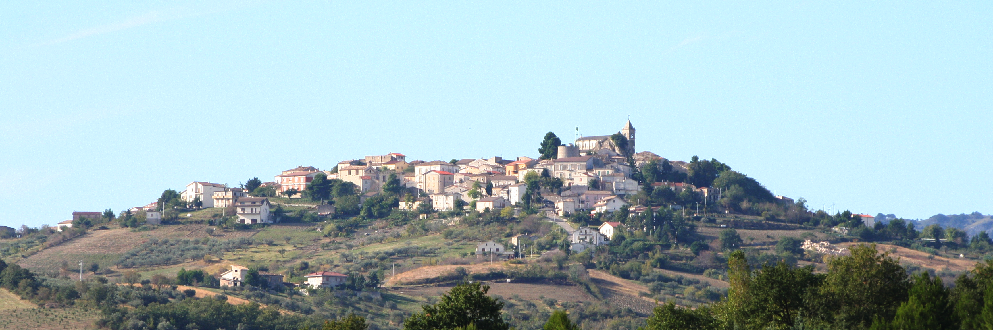 Piatranico Veduta del centro storico, Italy